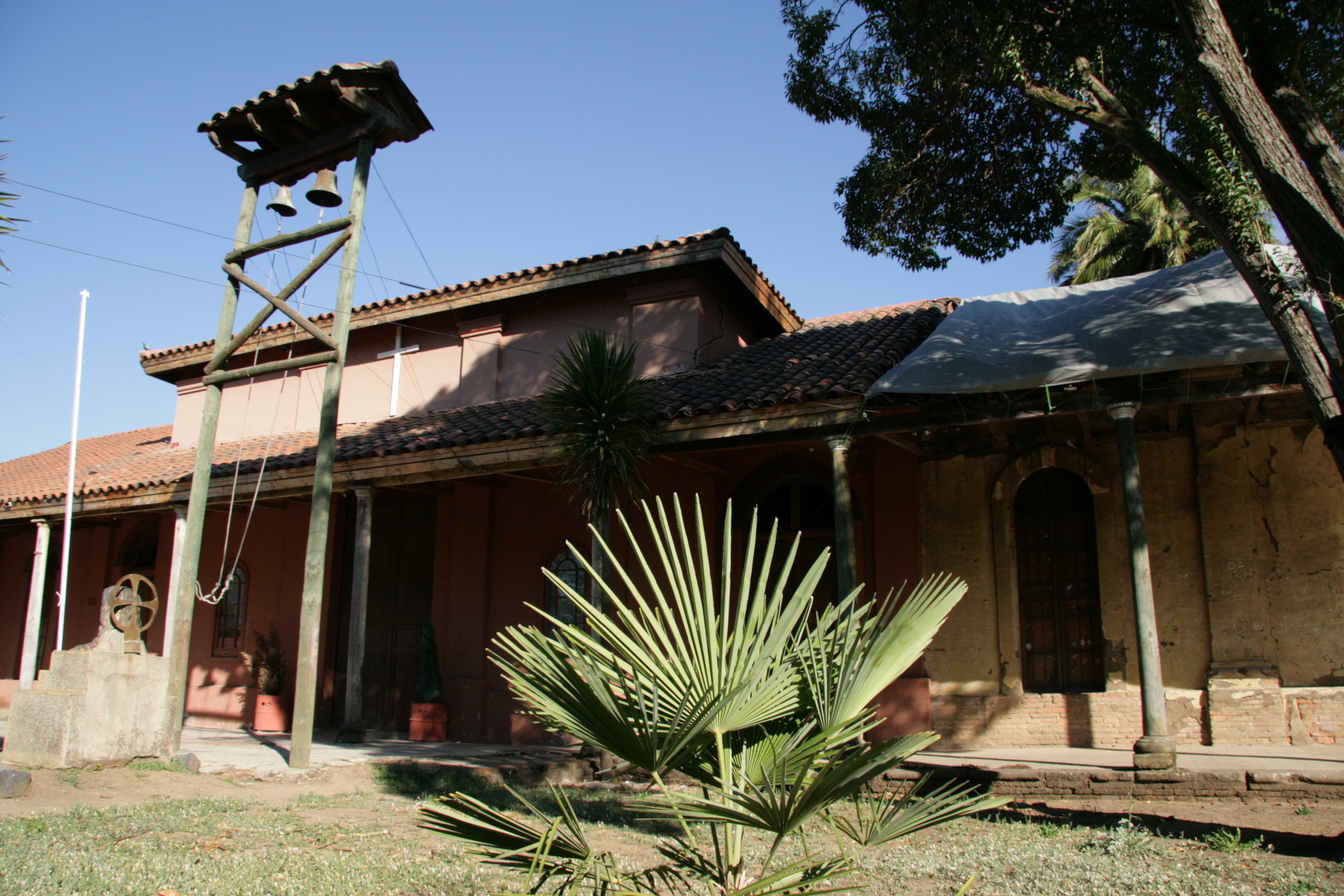 Capilla del Hospital San Juan de Dios de Chillán This is a photo of a national monument in Chile: 251